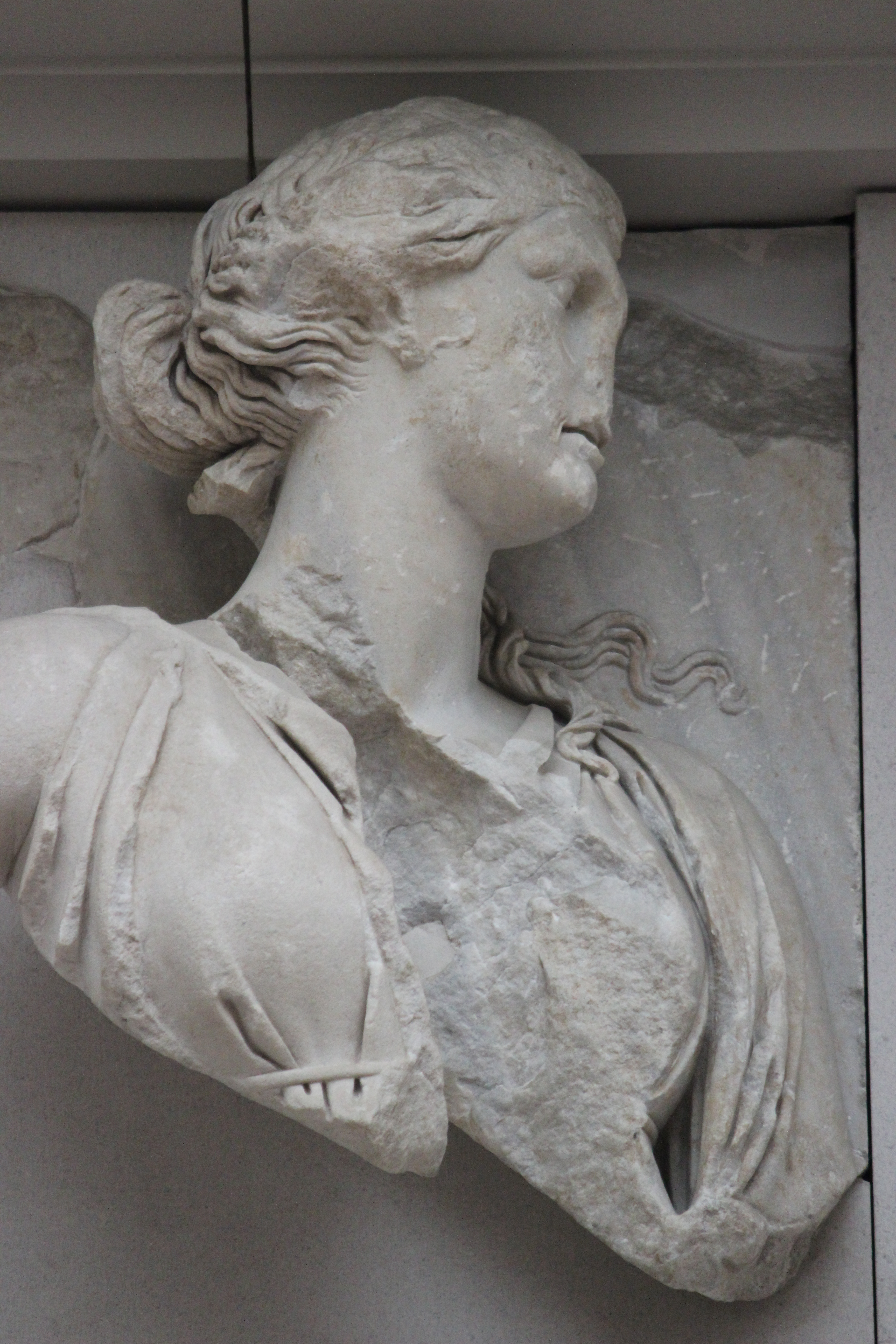 Theia lucha contra los gigantes. Altar de Pérgamo.